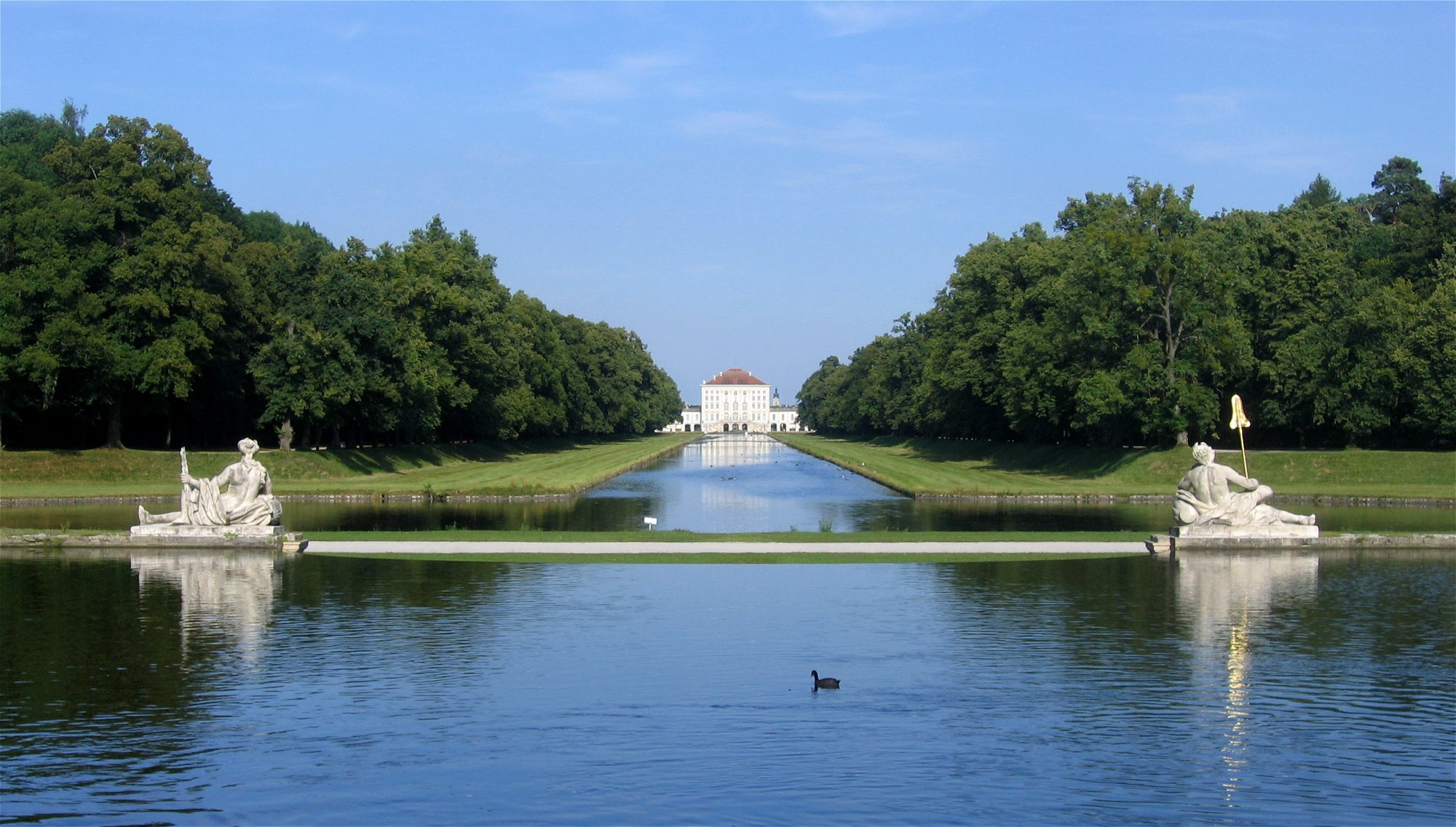 Schlosspark Nymphenburg, Durchblick von der Grossen Kaskade zum Schloss